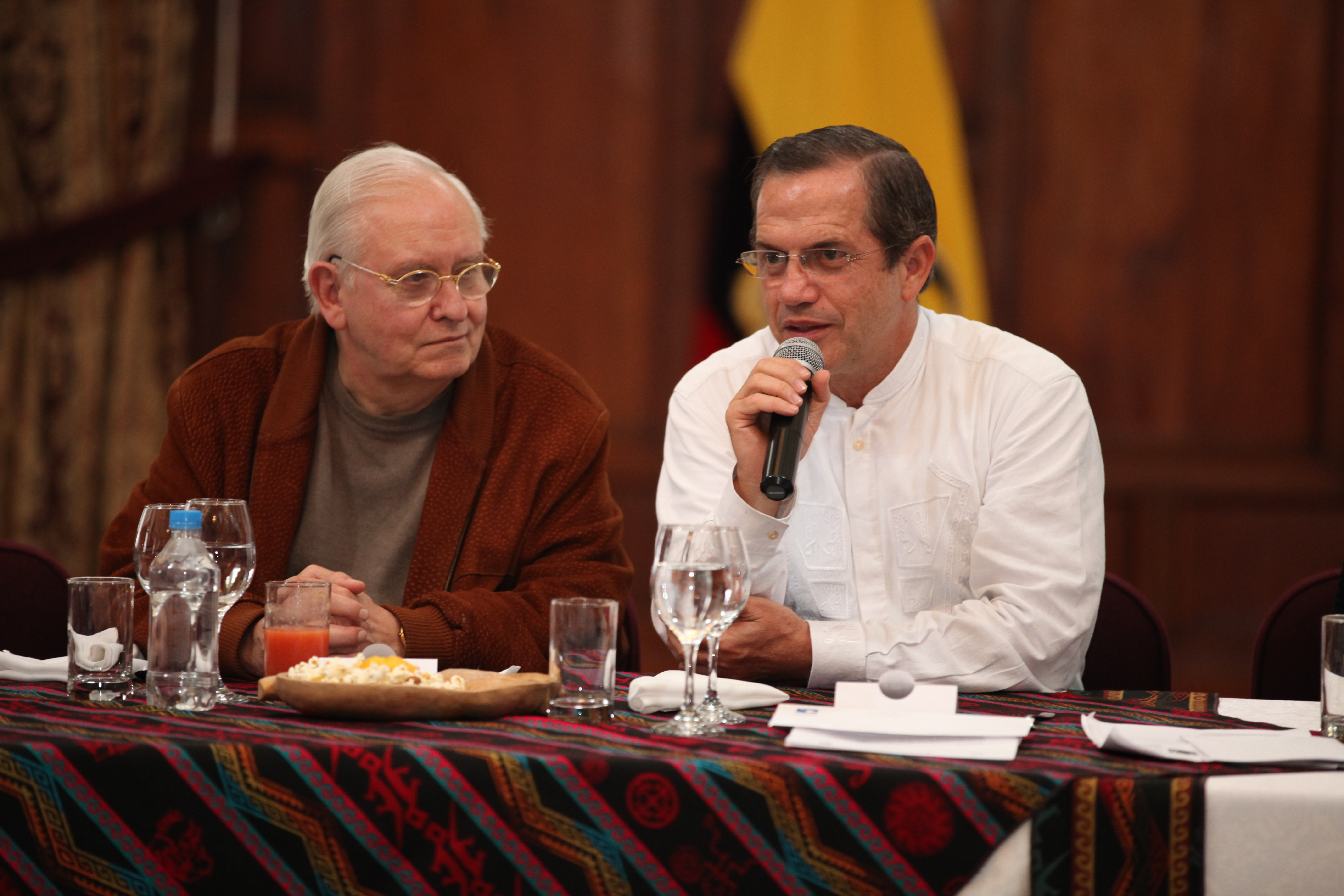 Quito (Ecuador), 17 de Mayo 2012. El Ministro Ricardo Patiño se reunió en un almuerzo en la Cancillería con el Profesor Ernesto Laclau. Foto: Fernanda LeMarie - MInisterio de Relaciones Exteriores, Comercio e Integración